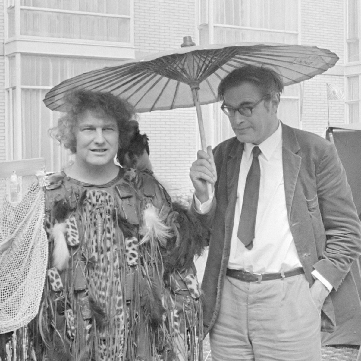 Persconferentie van Jan Wolkers en Godfried Bomans over verblijf op Rottumerplaat 10 tot 24 juli, in Apollohotel Amsterdam, (l) Wolkers, (r) Bomans 30 juni 1971